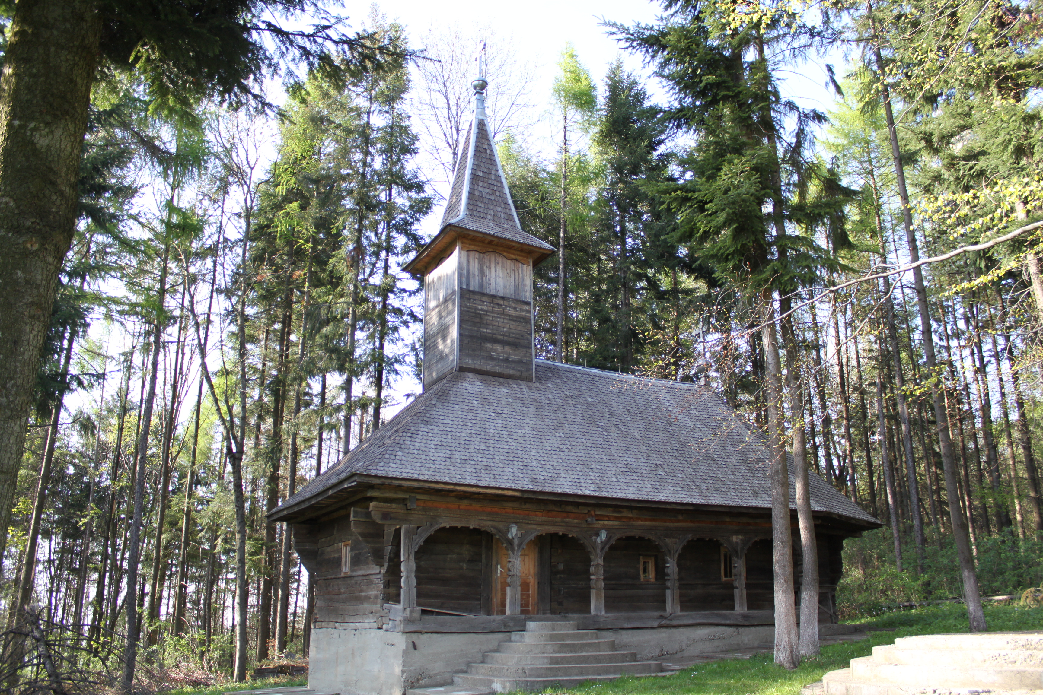 Biserica de lemn din Subpiatră, judeţul Bihor.